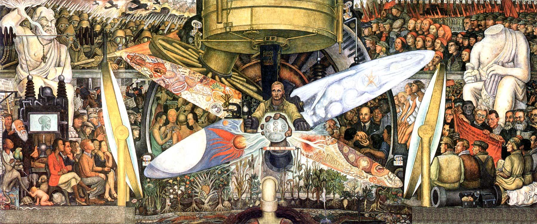 El Anahuac Mural